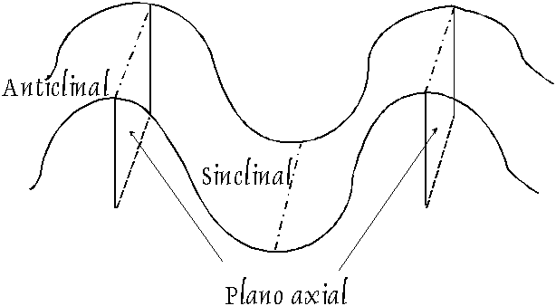 Esquema de un pliegue: anticlinal, sinclinal y plano axial.